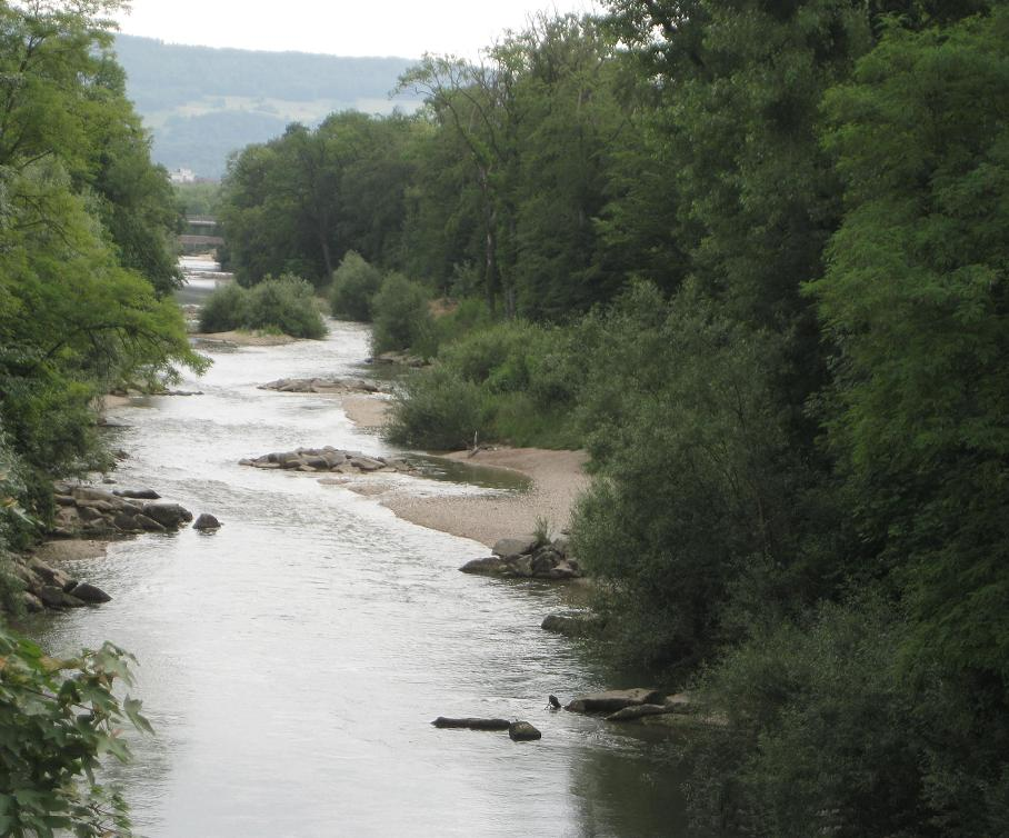 Birs (Fluss) bei Münchenstein Schweiz